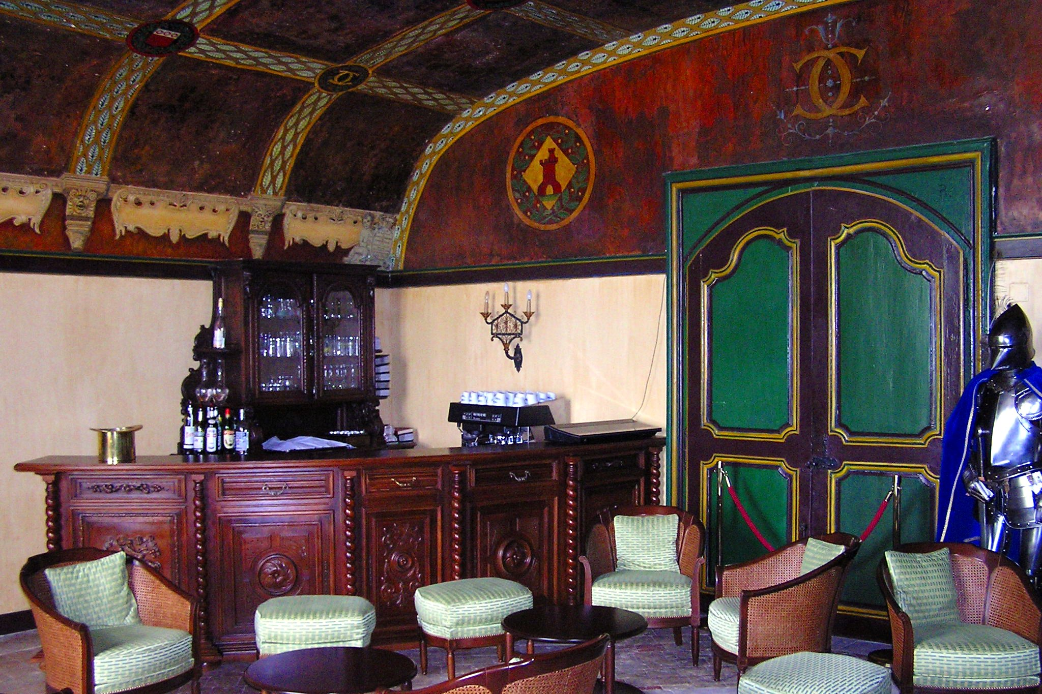 intérieur du chateau de Montbras (Meuse)